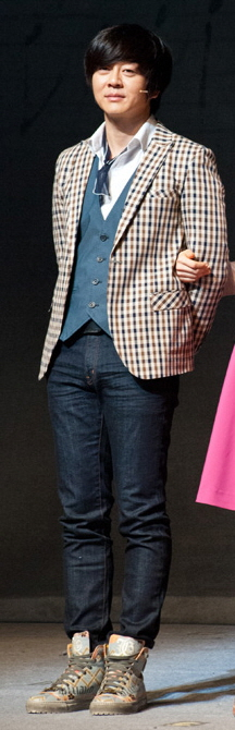 뮤지컬 '광화문연가' 공연 기념 프레스콜